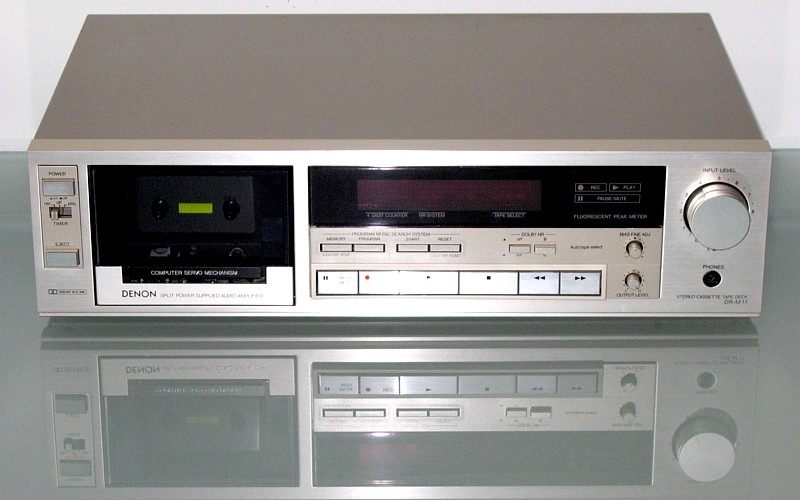 DENON Tapedeck dr-m 11